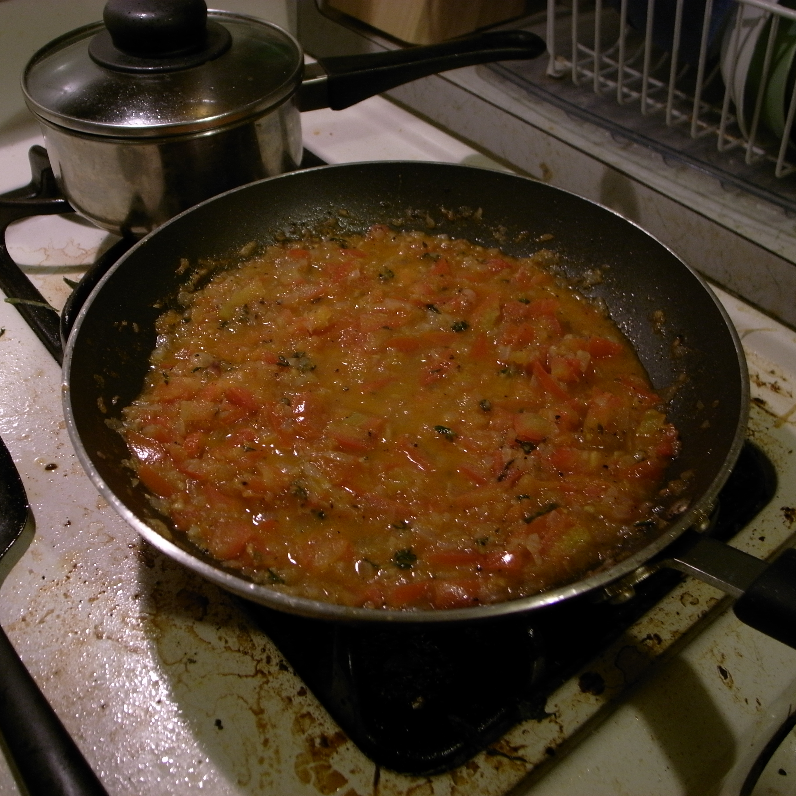 Tomato compote